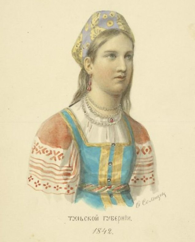 Солнцев Ф. Г. Девушка Тульской губернии, 1842 год. «Одежды Русского государства».